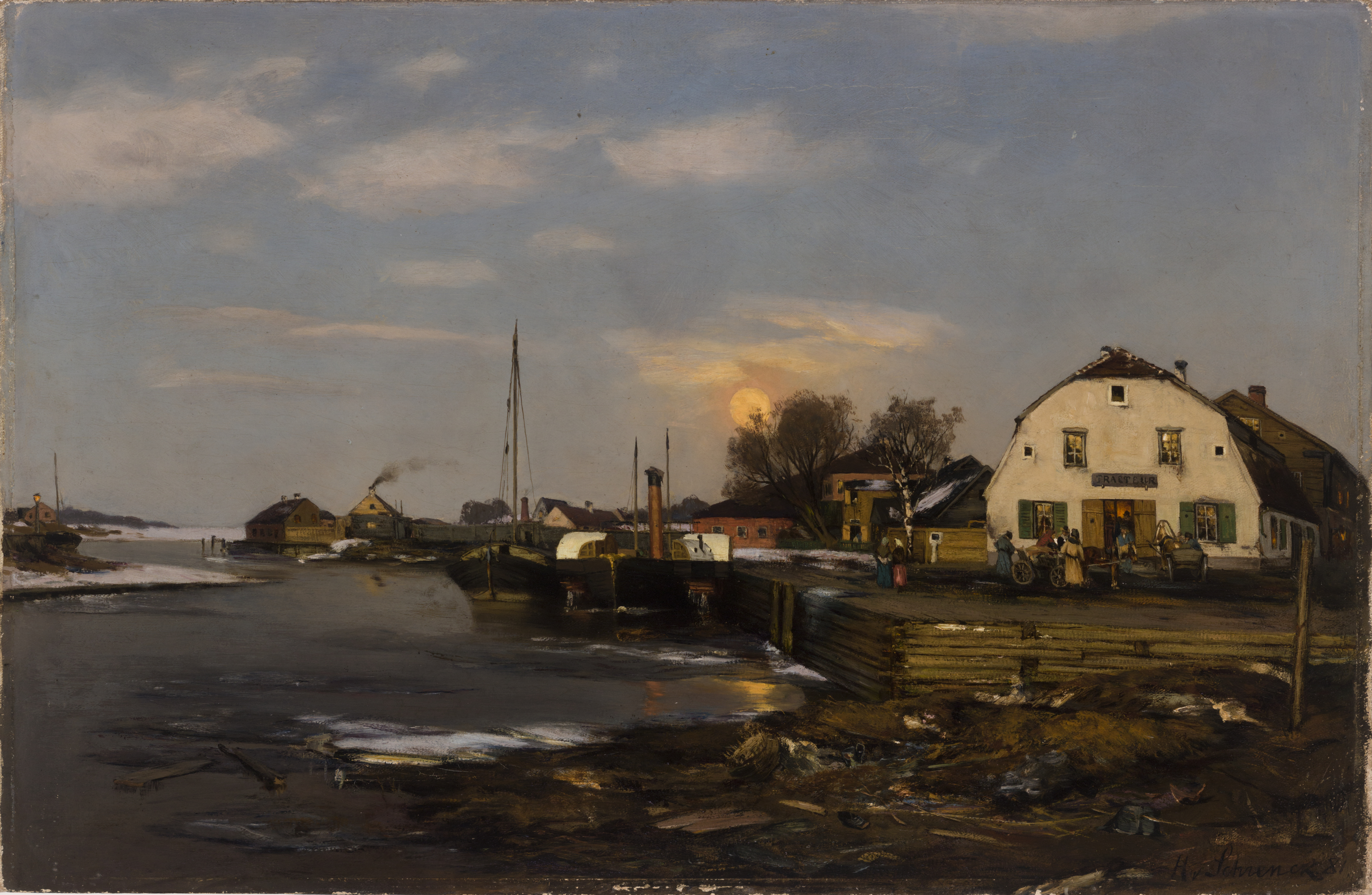 "Emajõgi" (1881). Õli lõuendil. 57,4 x 87,8 cm. This image on crowdsourcing geotagging platform Ajapaik MUIS: TKM TR 5361 M 908